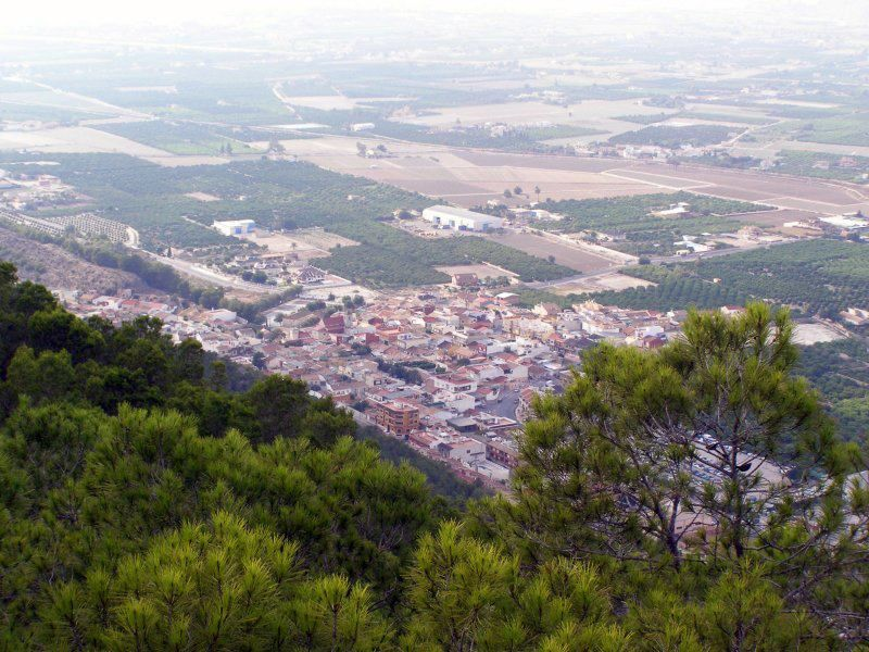 Vista desde el Cabezo de Hurchillo